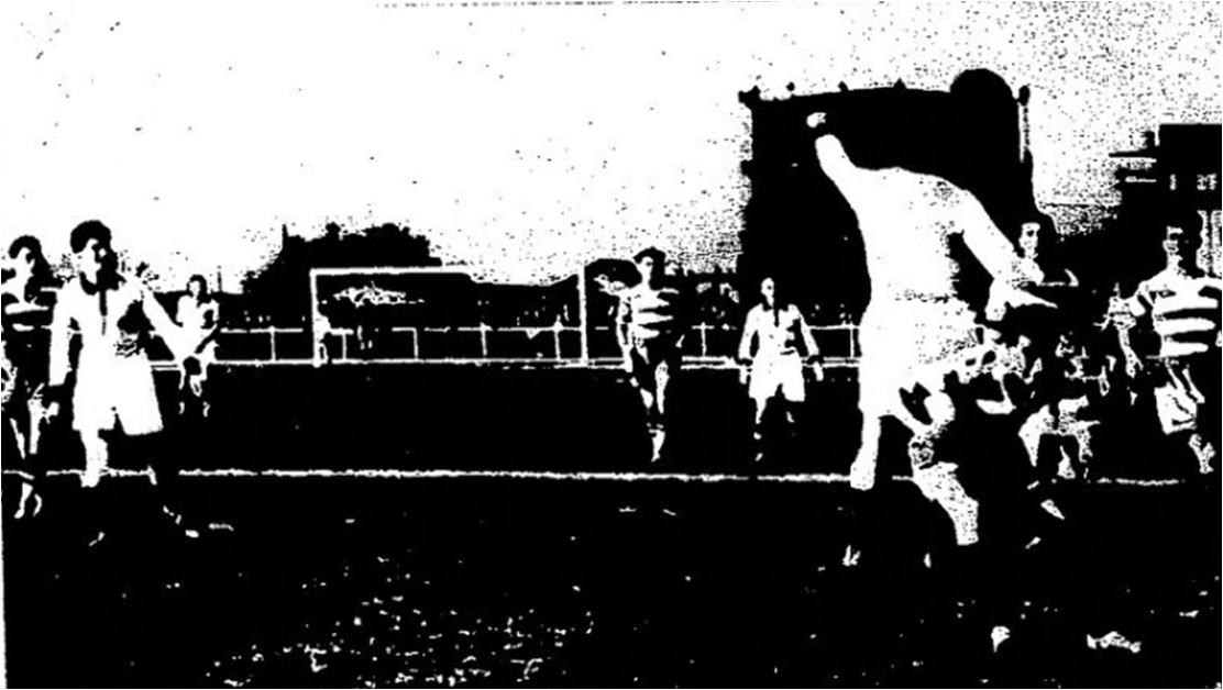 Dimanche 4 mars 1934 à Saint-Etienne, quart de finale de la Coupe de France de football 1933-1934 entre l'Amiens AC et le FC Sète. Malgré une charge de Benouna, un joueur amiénois dégage du pied.